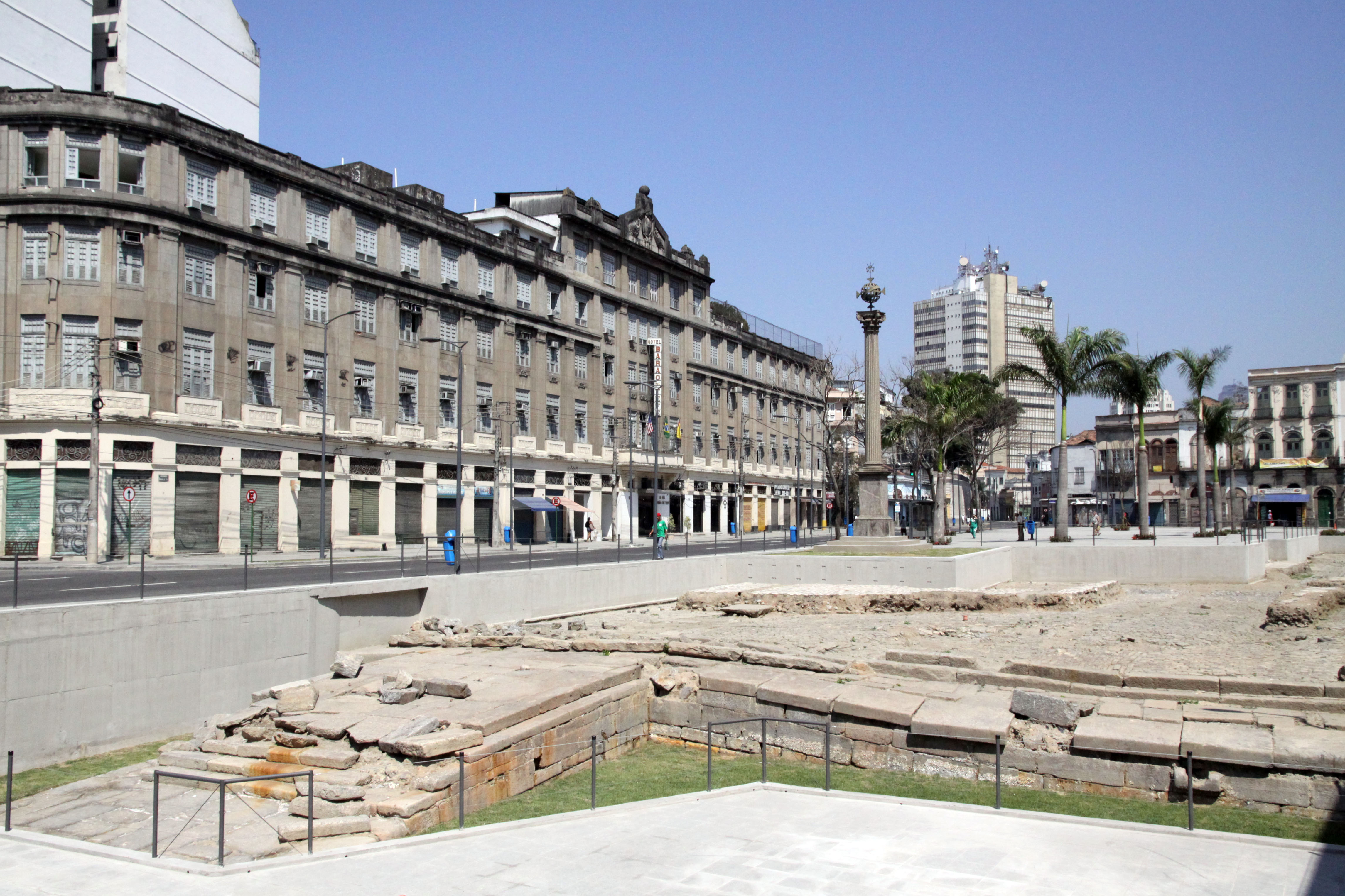 Cais da Imperatriz, construído para receber Teresa Cristina quando veio se casar com Dom Pedro II, e o Cais do Valongo, considerado o maior porto de escravos das Américas do Séc XIX. (ACRJ)